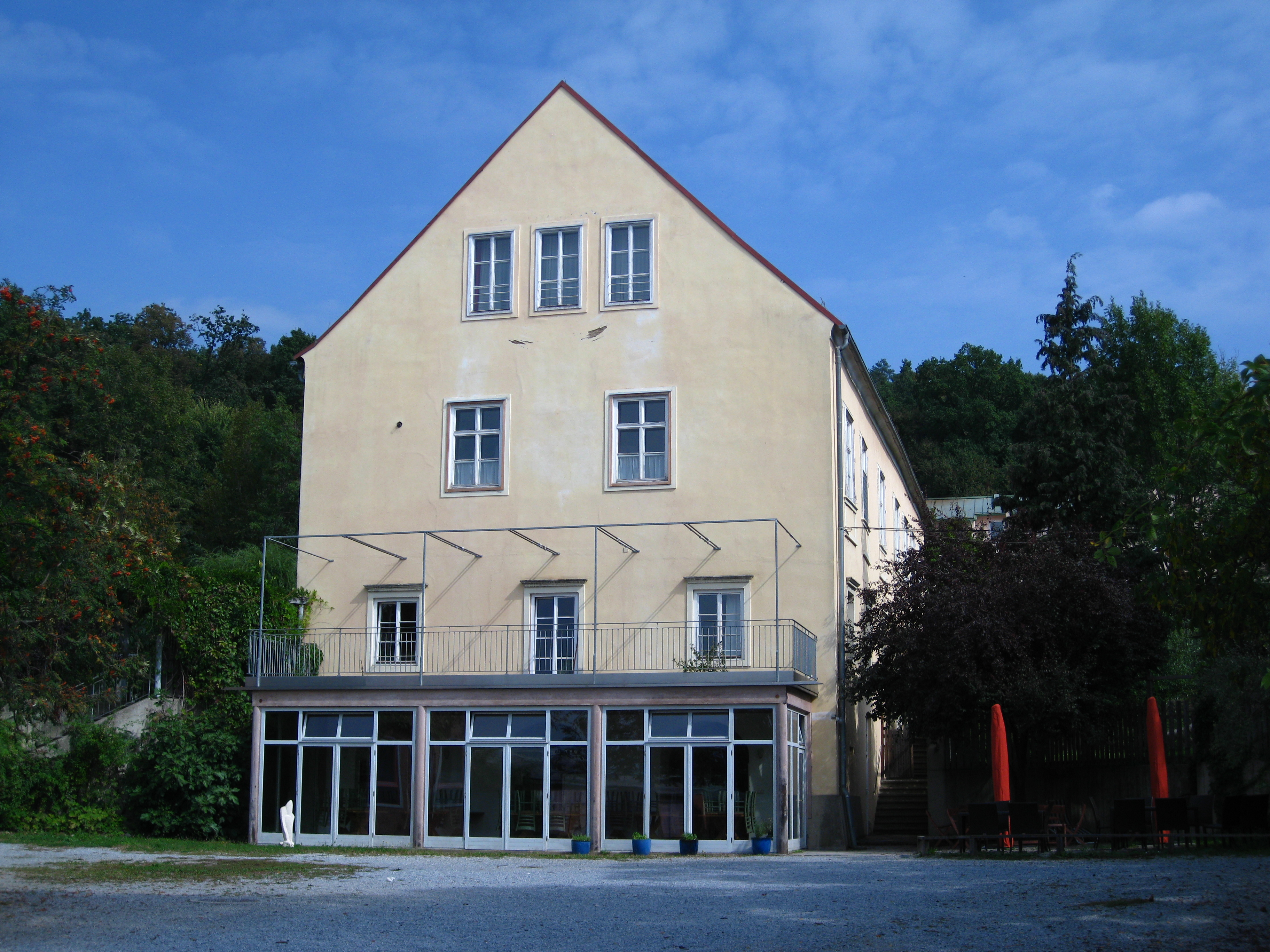 Graz VIII Schloss Messendorf freie Waldorschule